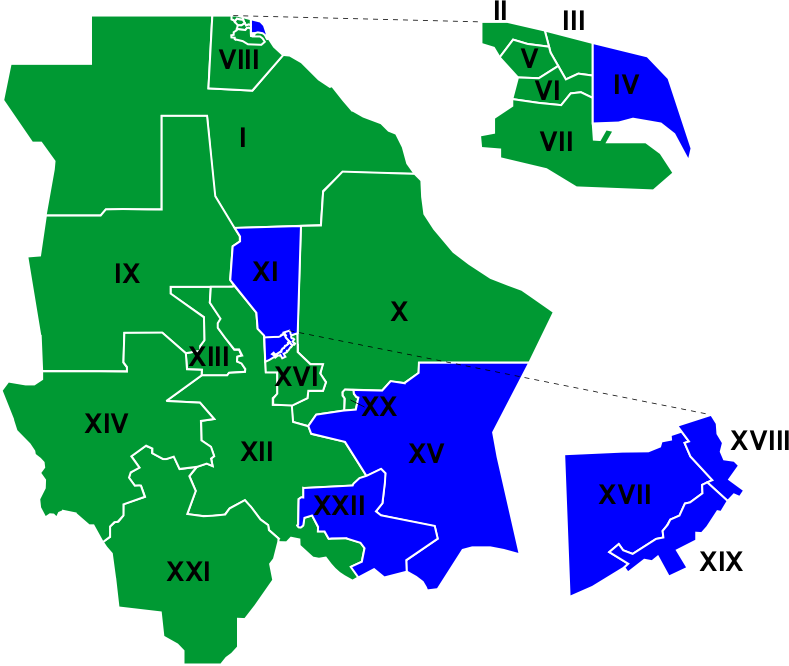 Resultados de la elección a Diputados por partido político en el estado de Chihuahua, México en 2007.